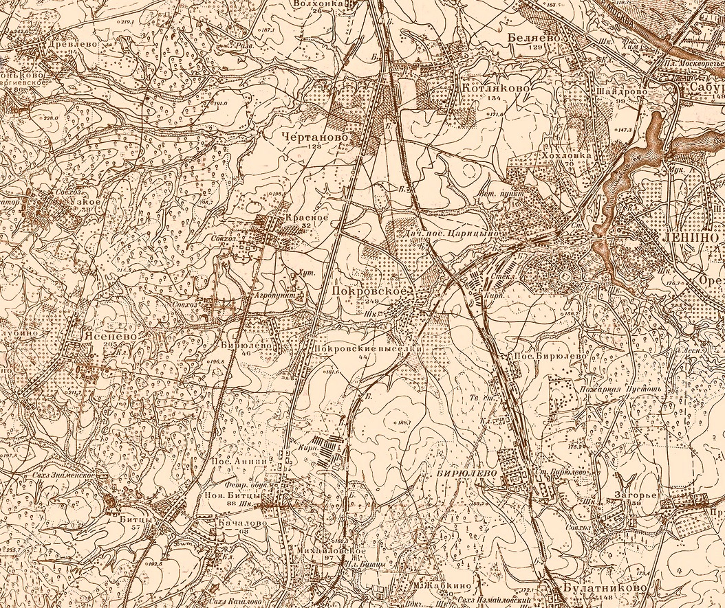 Москва и окрестности, 1931 год, фрагмент: территория современных Царицина (на карте Ленино), Чертанова, Бирюлёва.